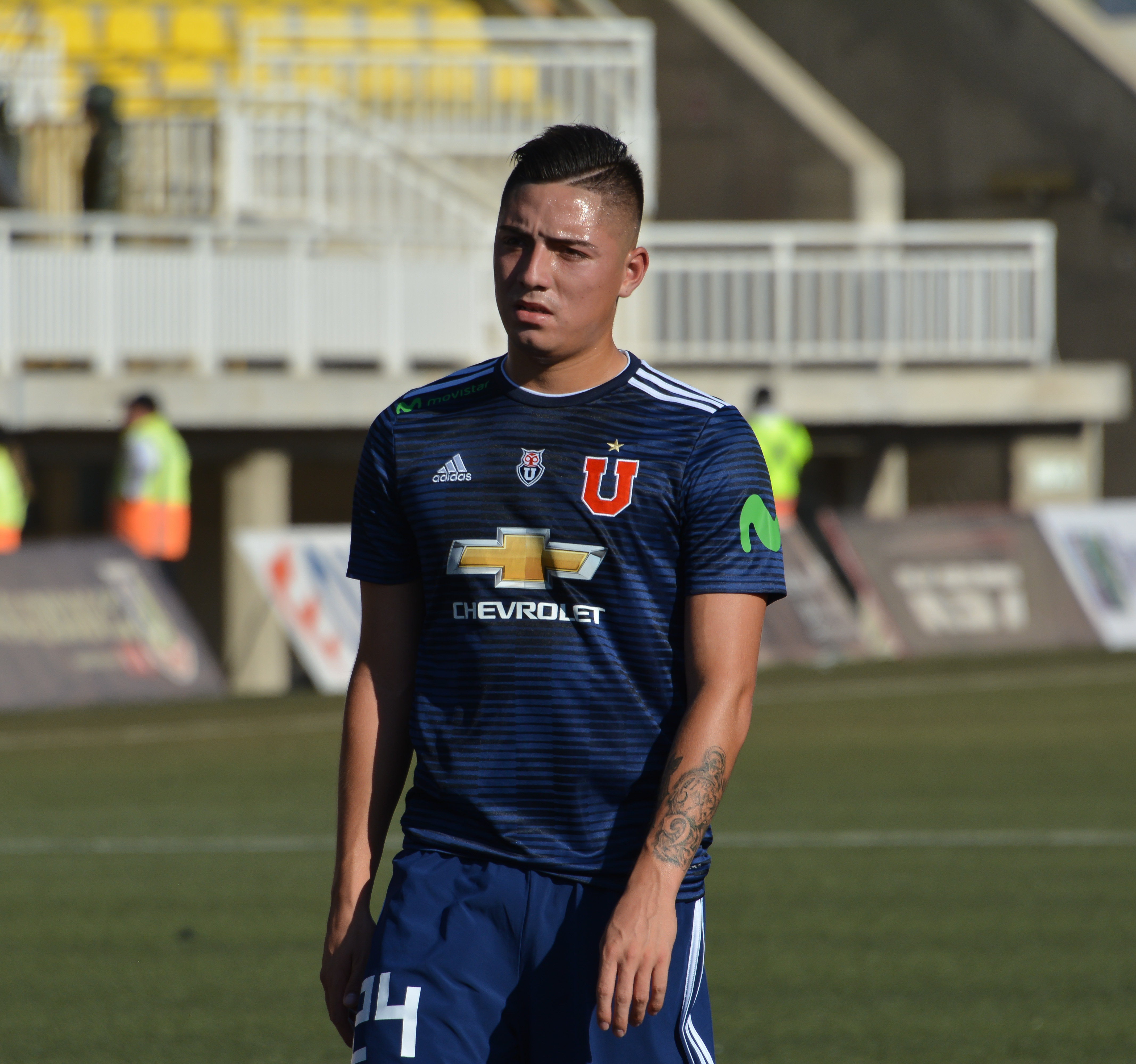 Unión La Calera v Universidad de Chile, Estadio Municipal Lucio Fariña Fernández, Quillota, Chile.